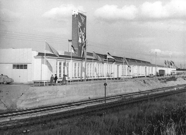 Rostock, Marienehe, Kongreßhalle, Sporthalle ADN-ZB Burmeister Vgt-Schm 21.5.1961 IV. Kongreß der Arbeiterjugend beider deutscher Staaten Pfingsten 1961 in Rostock Der IV. Kongreß der Arbeiterjugend aus beiden deutschen Staaten wurde am Pfingstsonntag (21.5.1961) in der Sporthalle Rostock-Marienehe durchgeführt. 2 500 Mädchen und Jungen aus Westdeutschland und 500 Delegierte aus den Bezirken der DDR nahmen daran teil. UBz: Aussenansicht von der Kongreßhalle in Rostock-Marienehe.